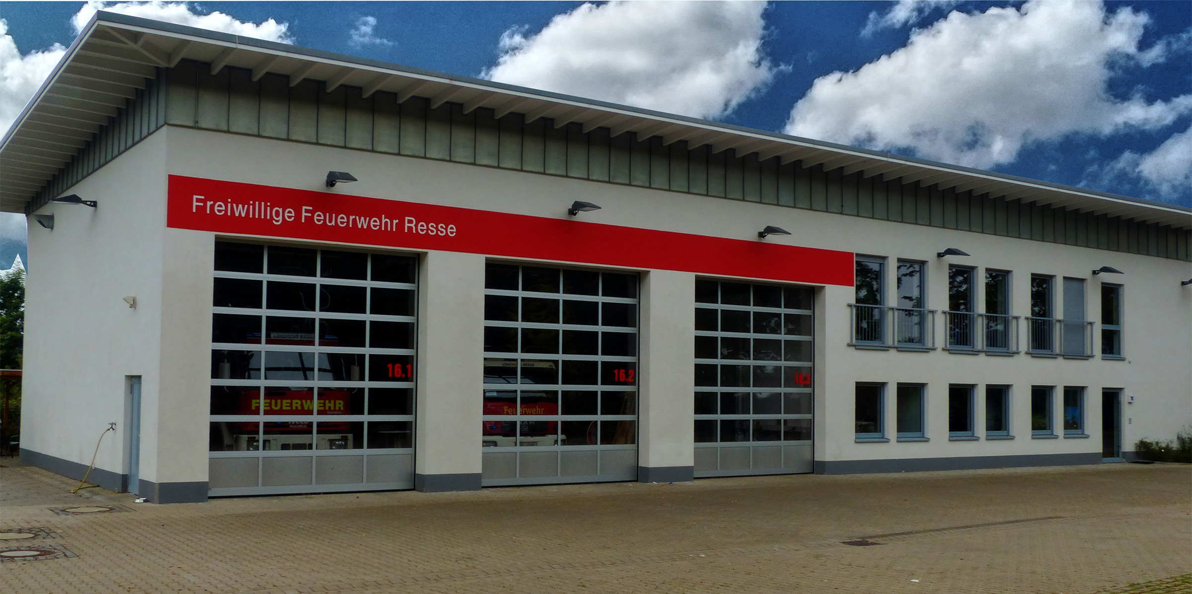 Freiwillige Feuerwehr Resse, Gelsenkirchen, Recklinghauser Straße/Lange Straße